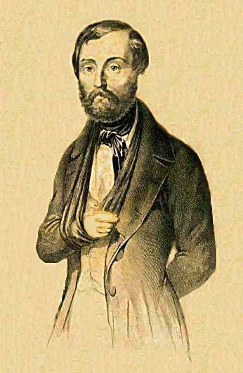 "Ritratto di Giuseppe Montanelli", litografia